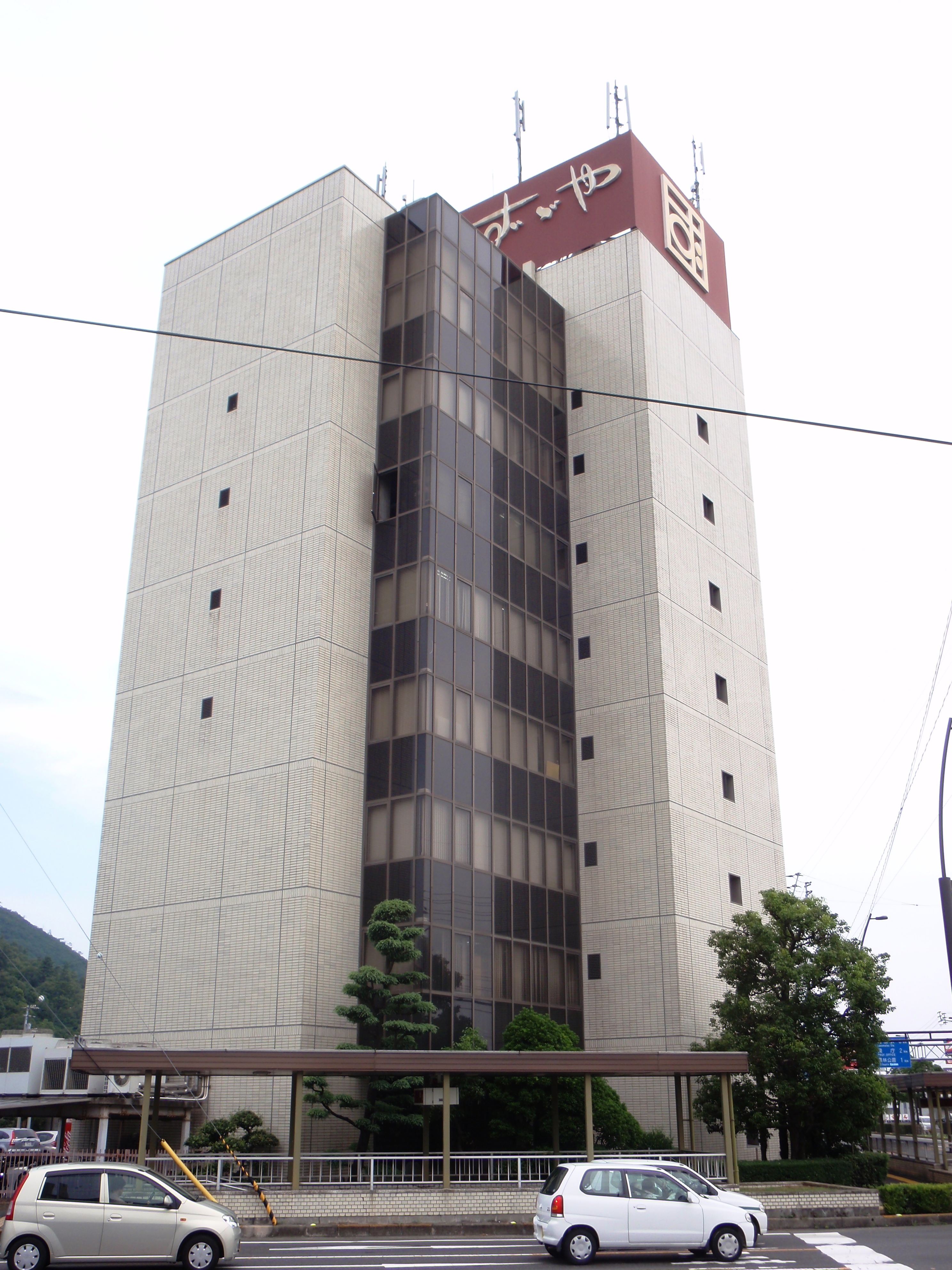 香川県高松市にあるずゞや本社。